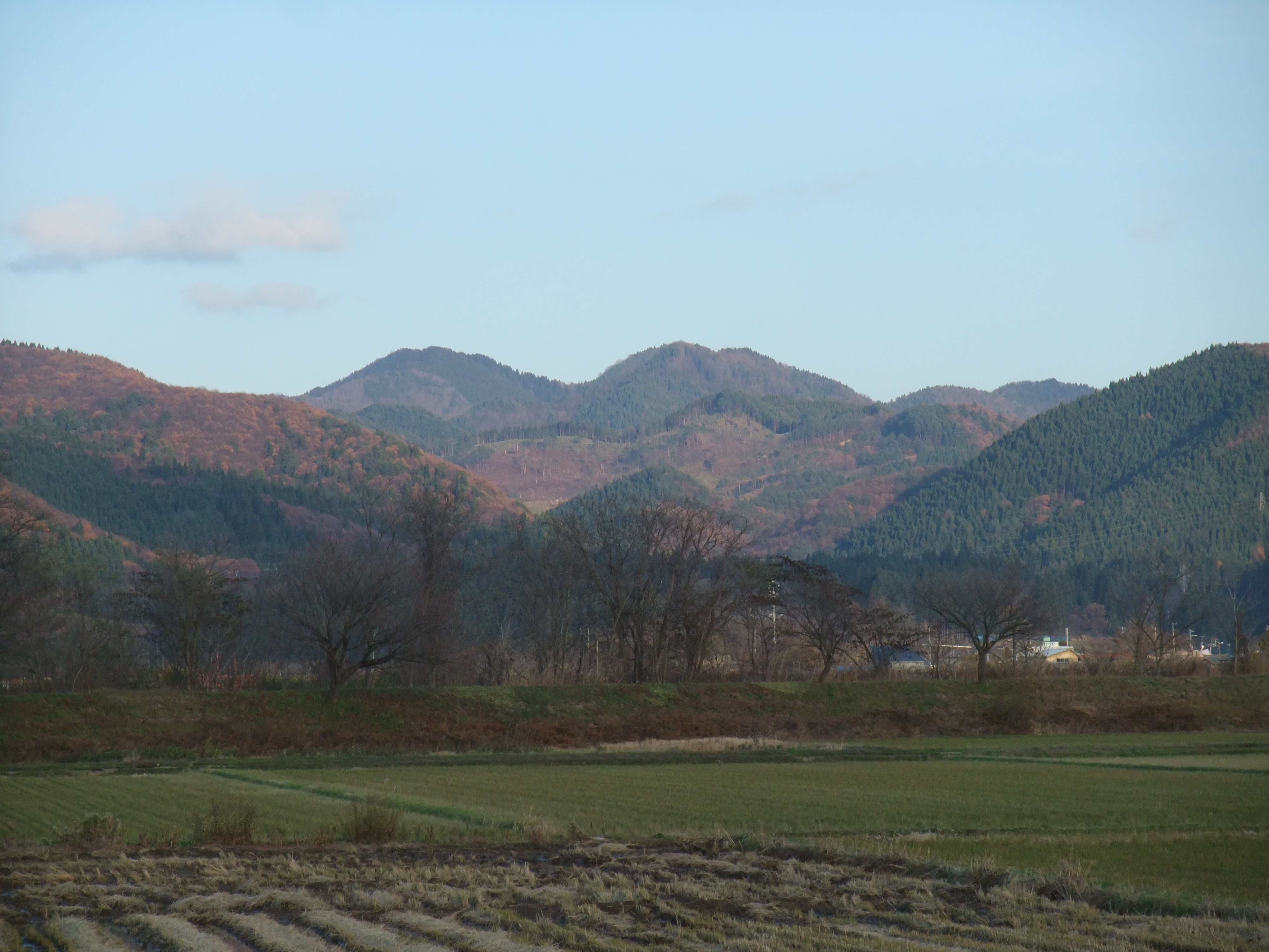 秋田県大館市片貝からのぞむ高森(山館)＿中央左